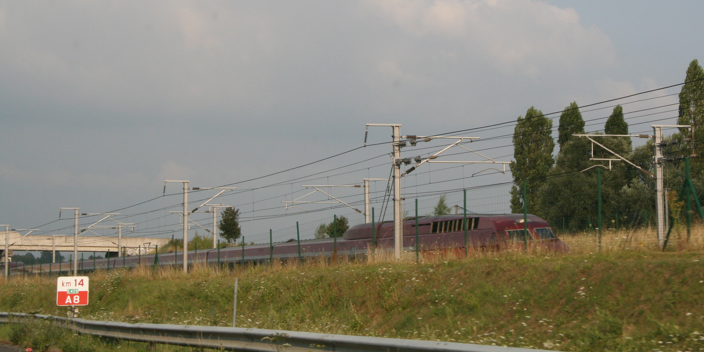 Photo d'un Thalys depuis l'autoroute belge A8